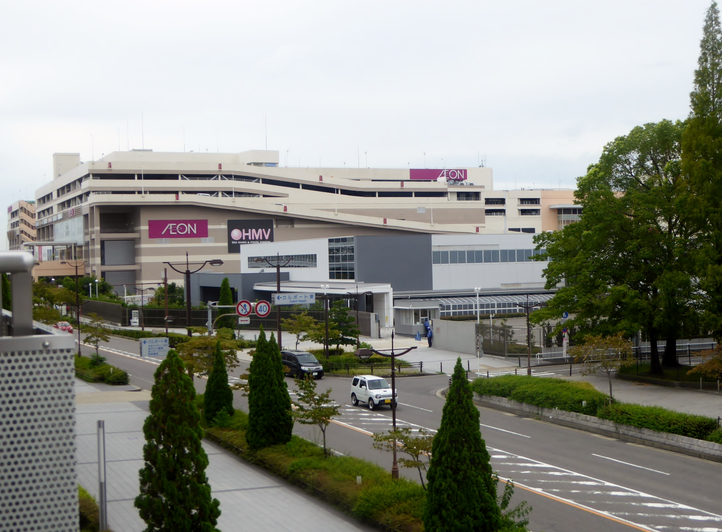 イオンモールナゴヤドーム前を撮影。